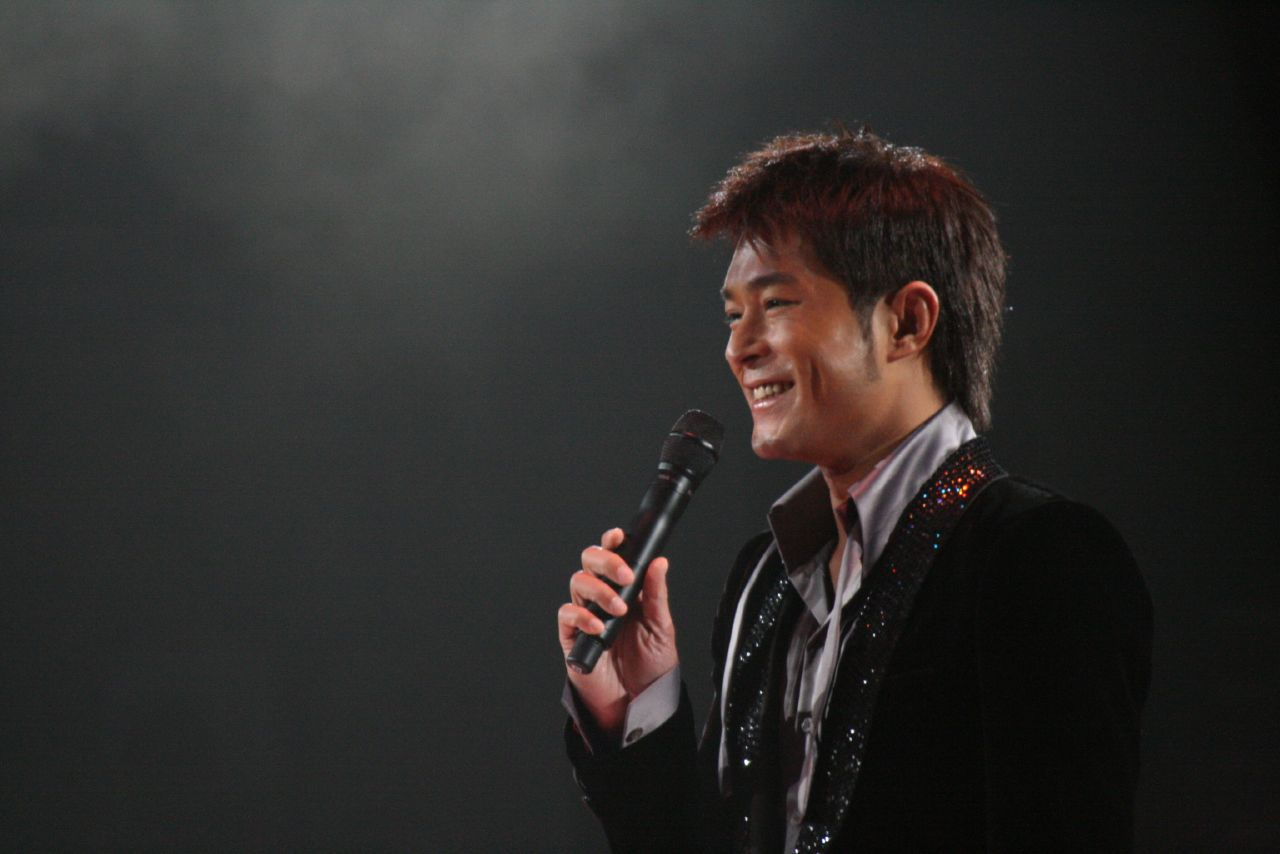 Louis Koo (古天樂)嘉賓古天樂齋咀唔唱